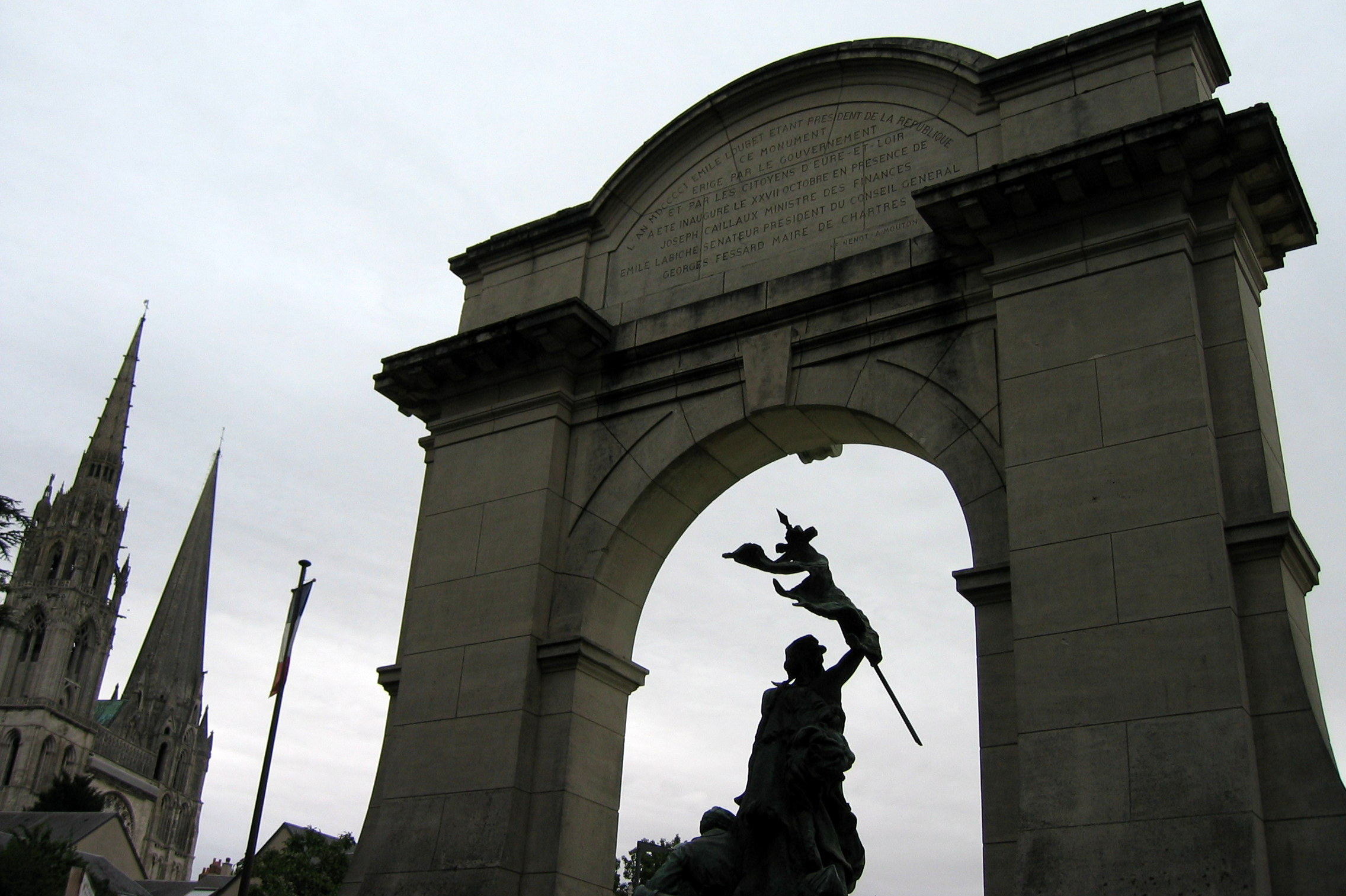 Monument à la mémoire des enfants d'Eure-et-Loir morts pour la patrie, place Châtelet, Chartres (France). "L'an MDCCCCI Émile Loubet étant président de la République, ce monument érigé par le gouvernement et par les citoyens d'Eure-et-Loir a été inauguré le XXVII octobre en présence de Joseph Caillaux ministre des finances, Émile Labiche sénateur président du Conseil général, Georges Fessard maire de Chartres